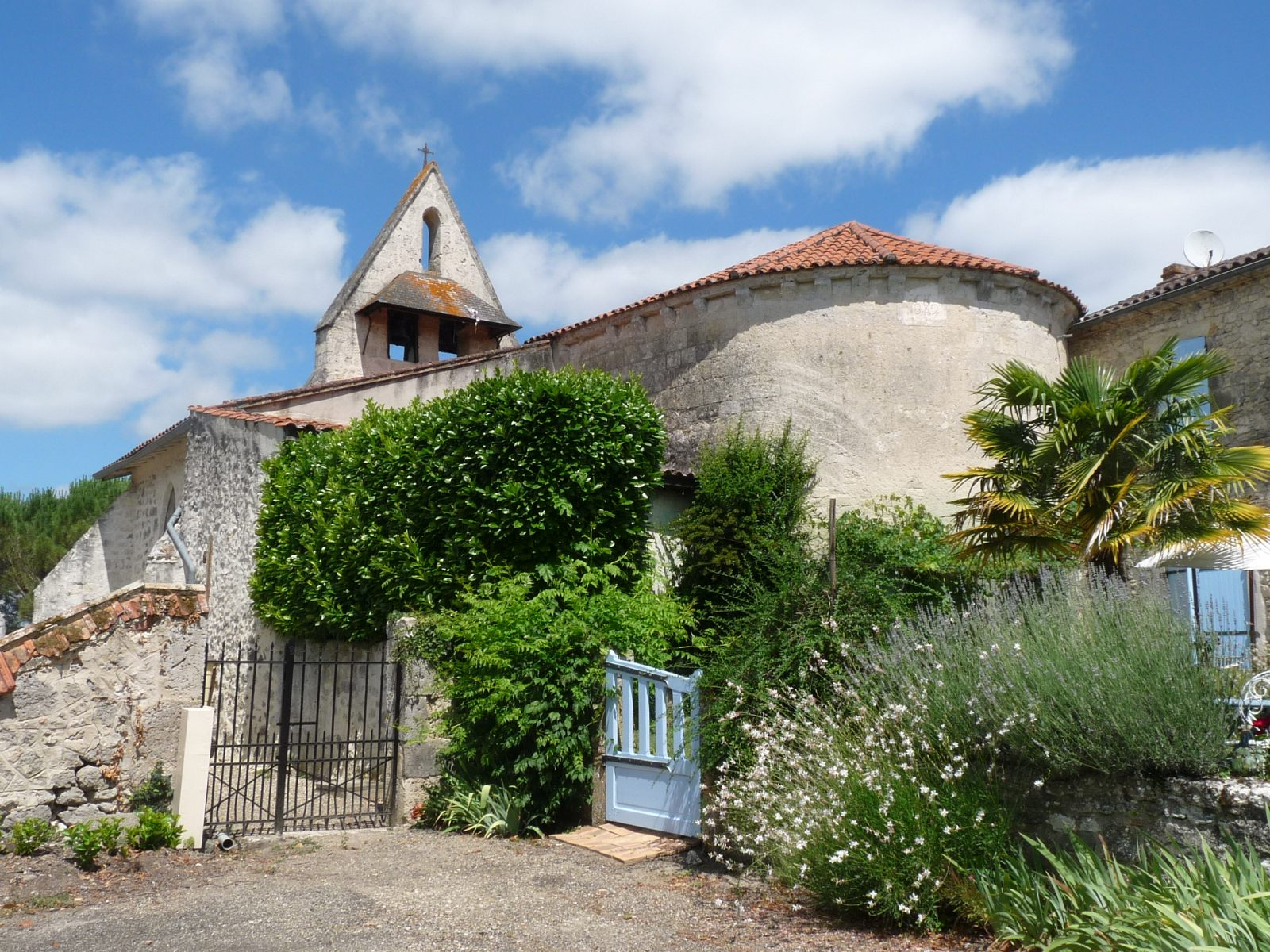 église Sainte-Radegonde et Sainte Christine d'Anzex, Lot-et-Garonne, France